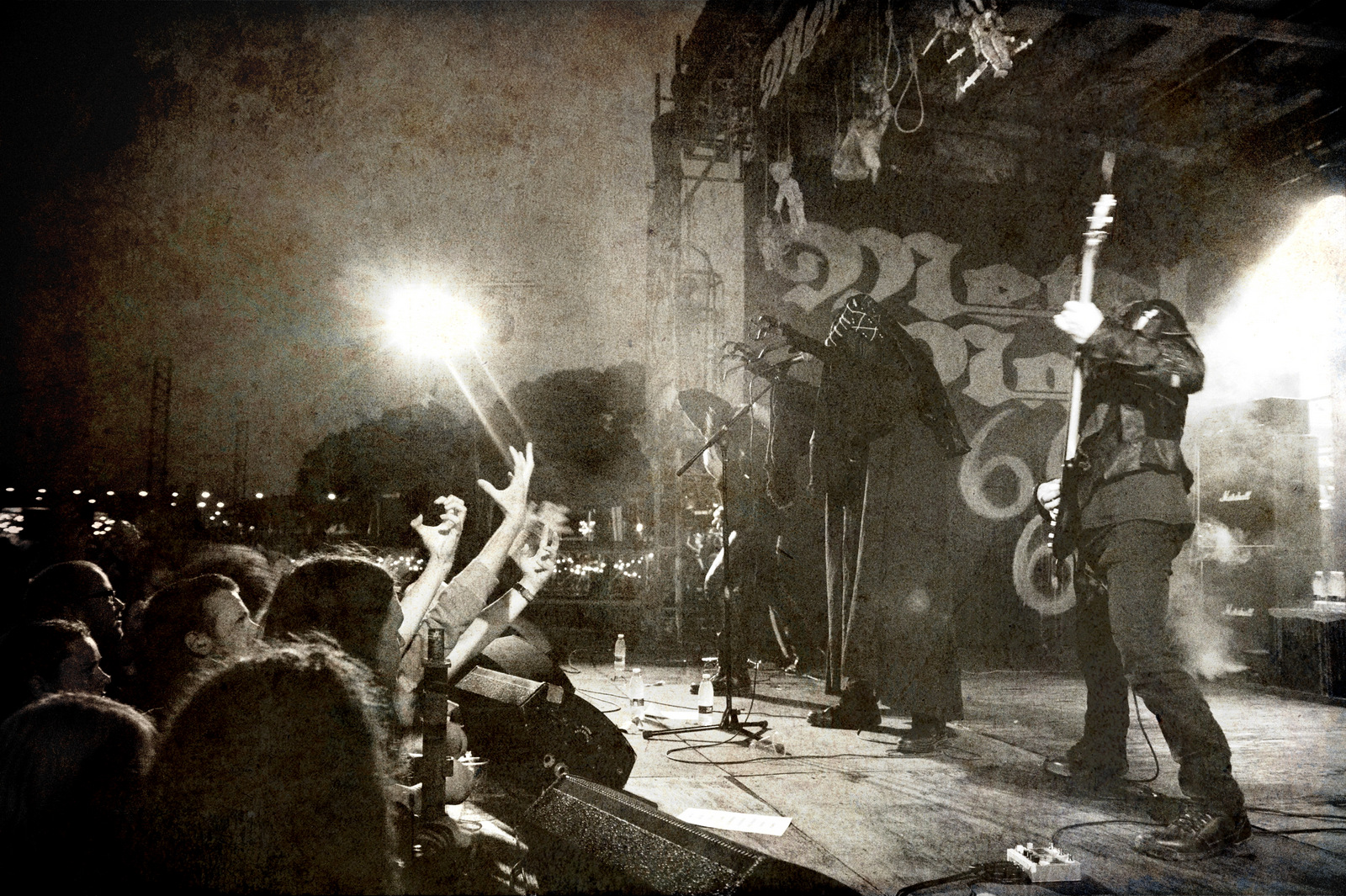 Portal at Metal Magic 2013